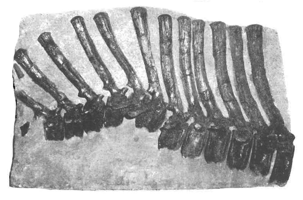 Barsboldia sicinskii gen. et sp.n., type specimen ZPAL MgD-11110, Nemegt Formation, N Nemegt, Nemegt Basin, Gobi Desert, Mongolia Caudals 5-16 in right lateral rien.